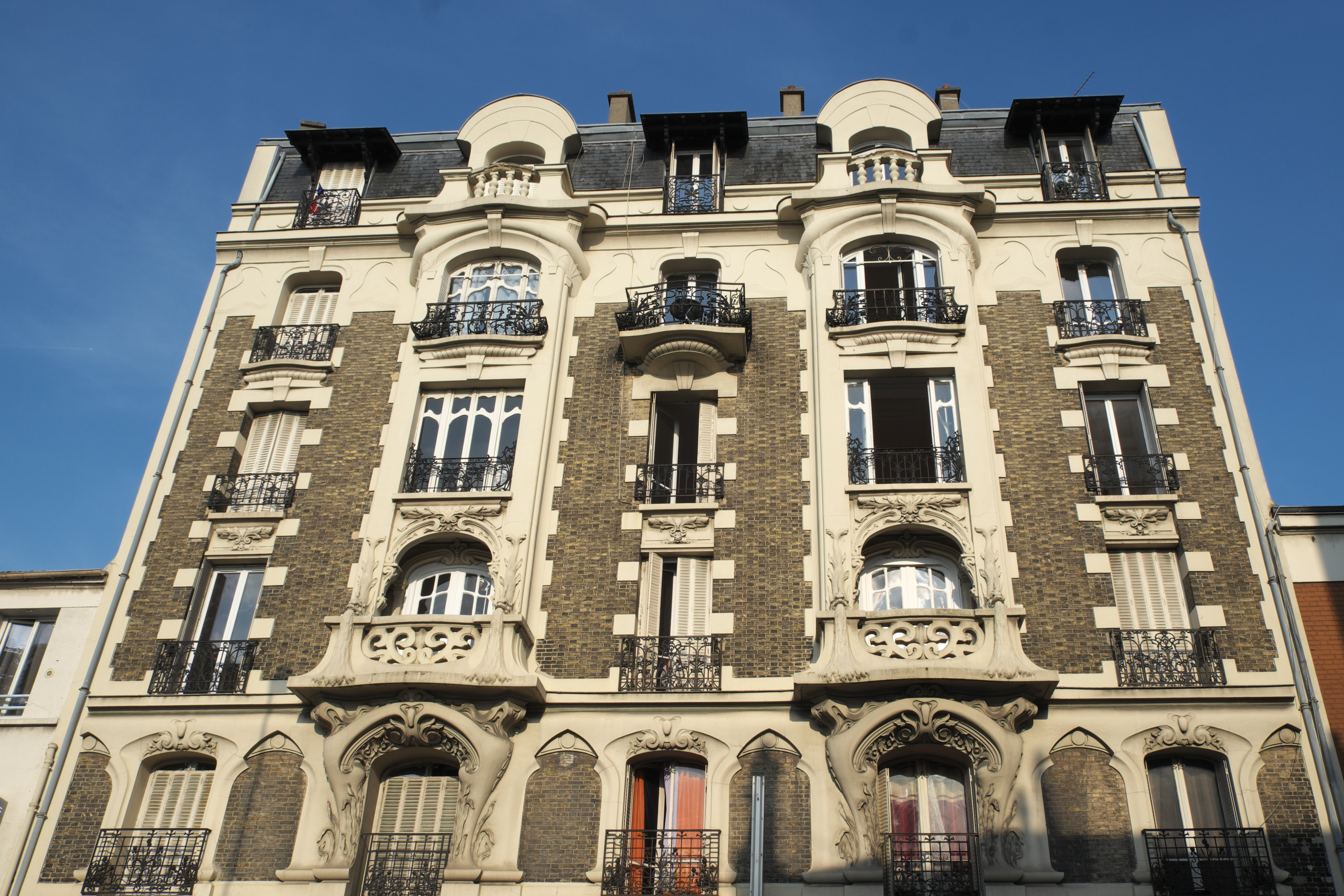 Wohnhaus, Boulevard Anatole France n° 14, in Aubervilliers im Département Seine-Saint-Denis (Île-de-France/Frankreich), um 1900 erbaut